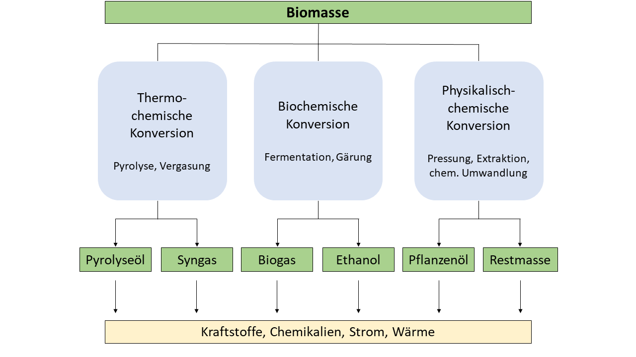 Schaubild zur Biomassekonversion/ Biomasseumwandlung. Der Ausgangspunkt ist Biomasse (grün dargestellt). Die Methoden zur Biomassekonversion lassen sich grob in drei Oberkategorien einteilen (blau dargestellt), die zu verschiedenen Produkten ( Auswahl grün dargestellt) führen. Diese können in weiteren Schritten dann zu Endprodukten (Auswahl gelb dargestellt) verarbeitet werden.